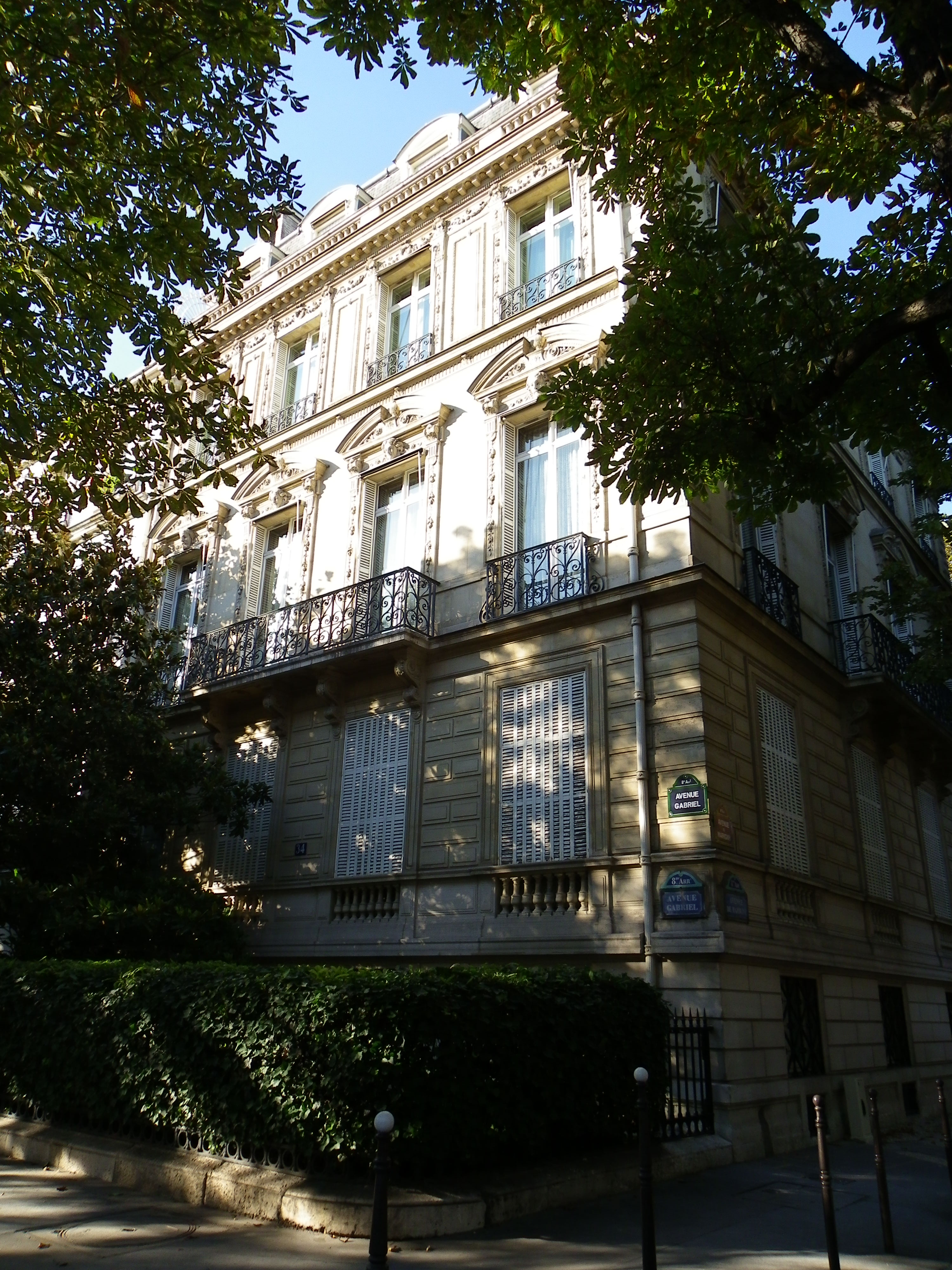 Immeuble à l'angle du 1 avenue de Marigny et du 34 avenue Gabriel à Paris (Inscrit)